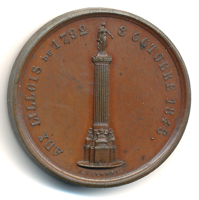 Lille, médaille frappée à l'occasion de l'érection de la colonne de la Déesse, 1845, bronze, 26mm, signée A. Lecomte